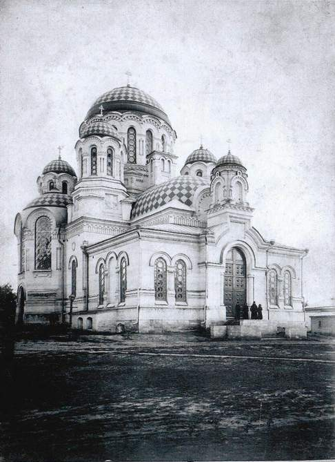 Николаевский мужской монастырь на улице Ново-Никольской (ныне Осипенко), Самара